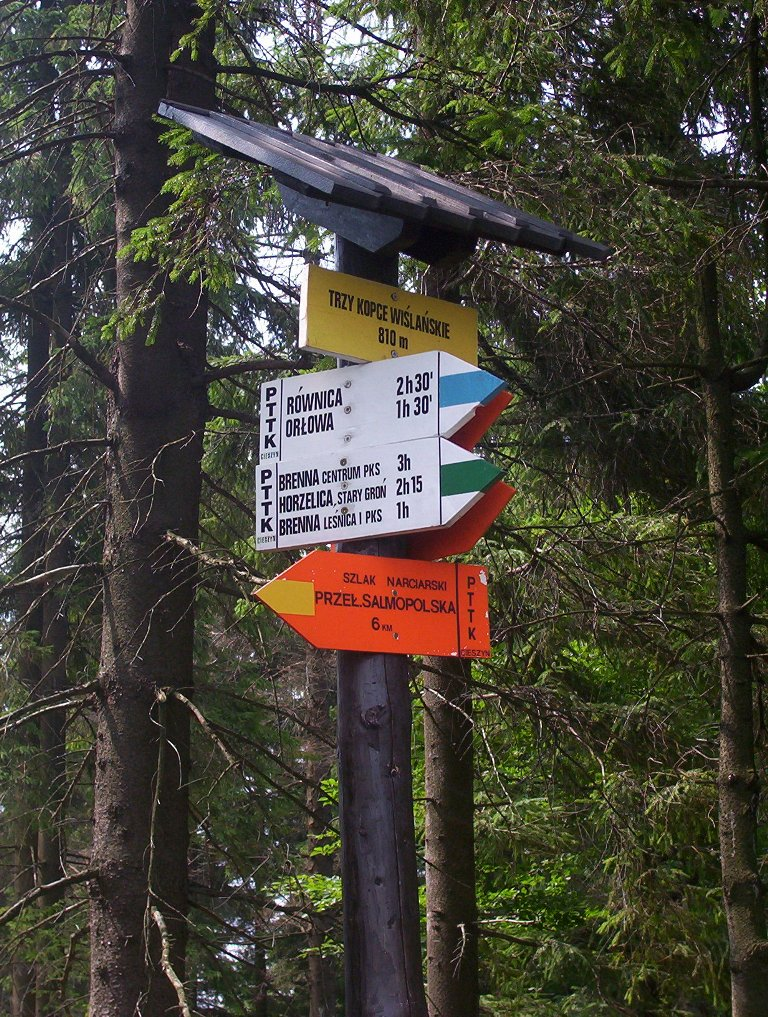 Drogowskaz na szczycie Trzech Kopców